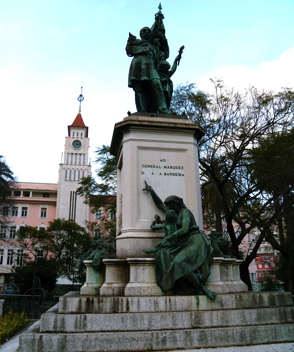 Памятник маркизу Бернардо Са-да-Бандейра